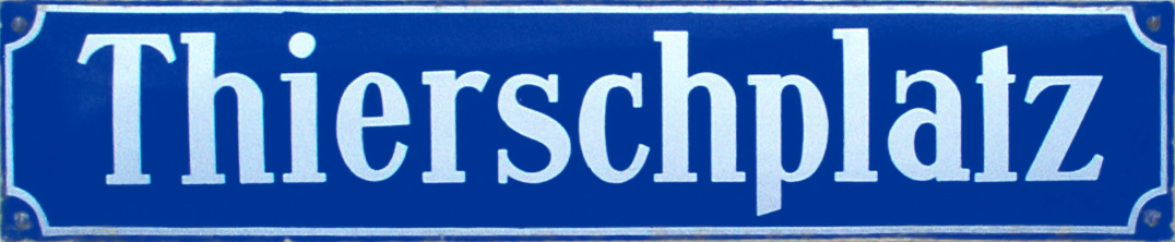 Straßenschild „Thierschplatz“